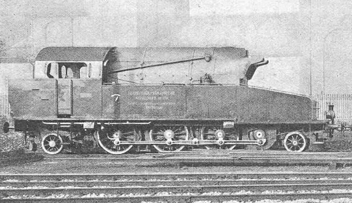 Hochdruck-Lokomotive „Winterthur“ für 60 atm Kesseldruck